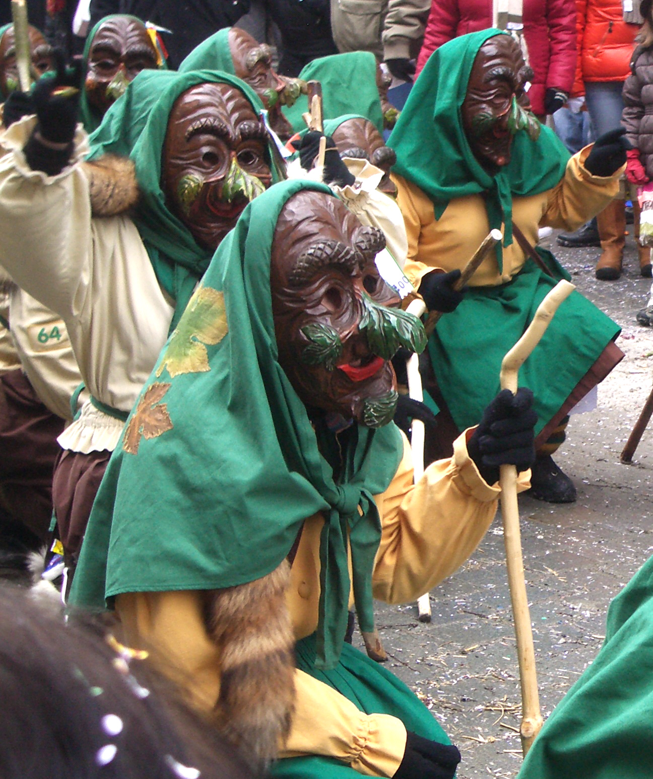 Narrensprung in Ravensburg am Fasnetsmontag 2010 Narrenverein Grünkraut e. V., Narrenfigur: Schwende-Marie Weblink